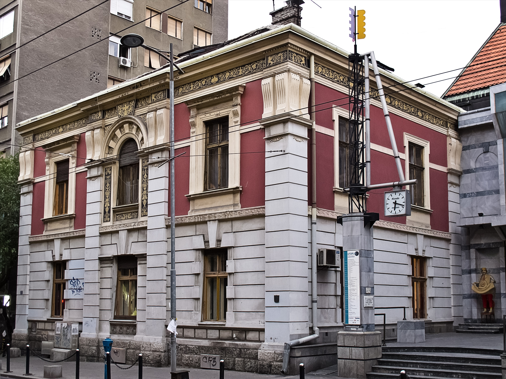 Дом Јеврема Грујића, Светогорска 17, Стари град, Београд, Србија